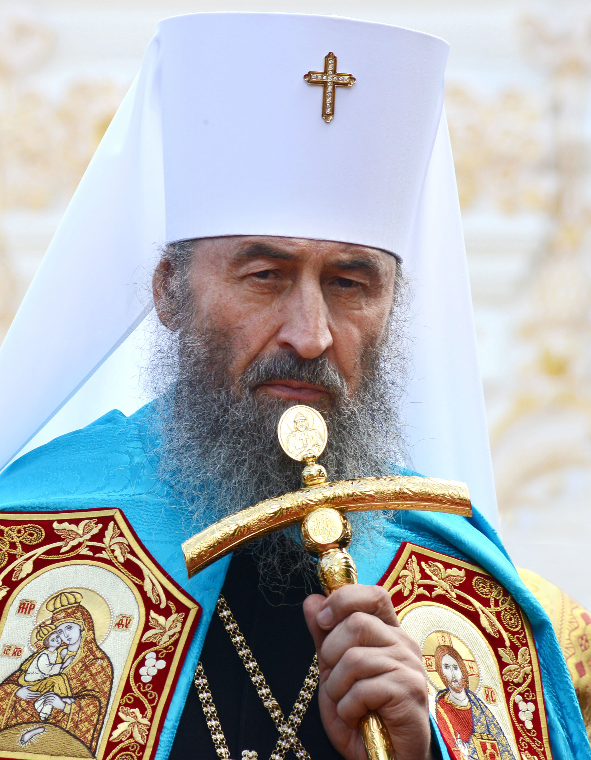 Блаженнейший Митрополит Киевский и всея Украины Онуфрий. Интронизация в Киево-Печёрской лавре 17 августа 2014 года